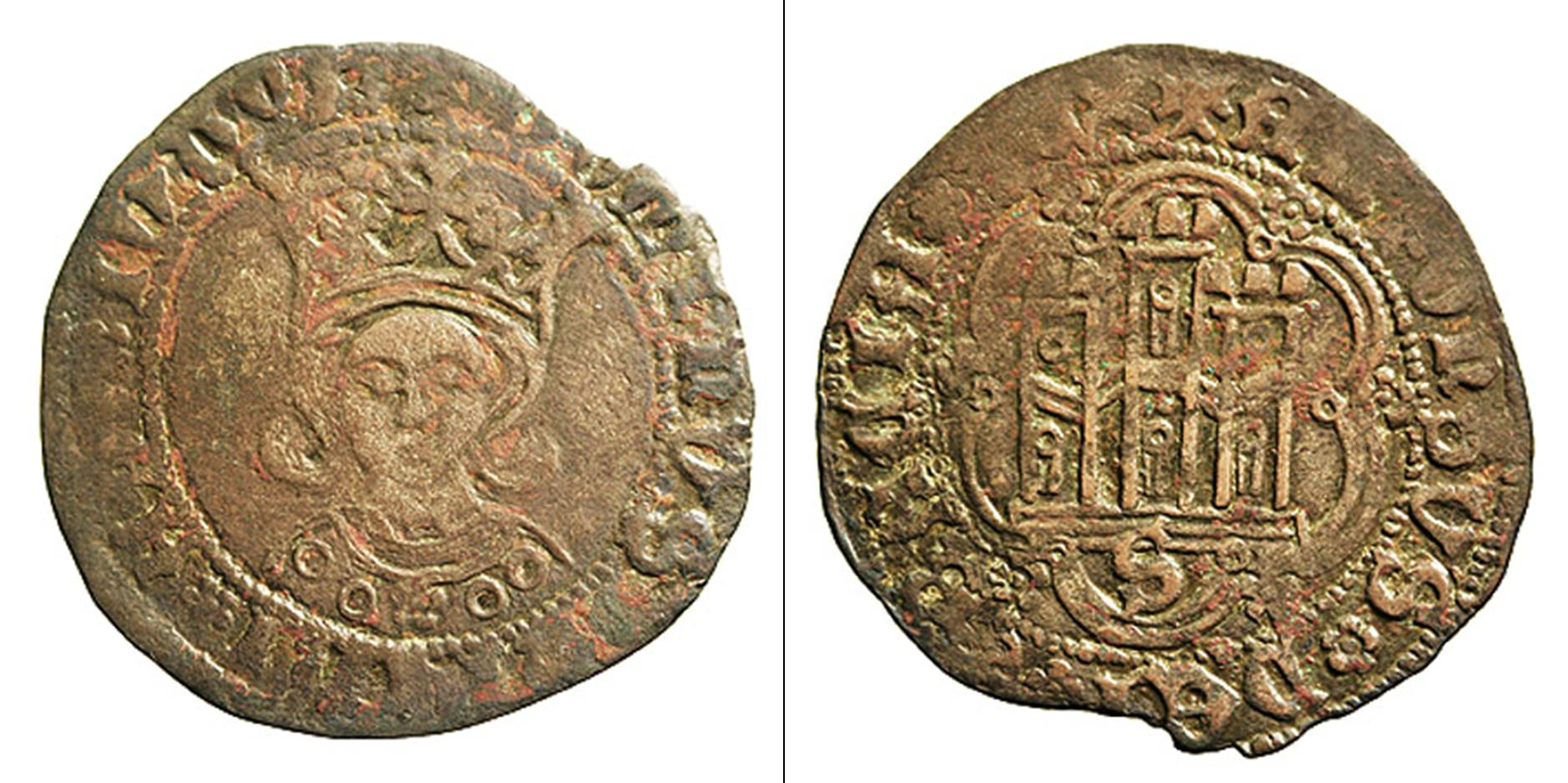 Moneda de Alfonso "de Castilla" o "de Ávila" (pretendiente al trono de Castilla y León en 1465-68). Cuartillo. Vellón. Sevilla. Fuente citada: Álvarez Burgos, F. Catálogo general de la Moneda medieval Castellano-Leonesa, siglos XI-XV. Madrid, 1998, p.852.